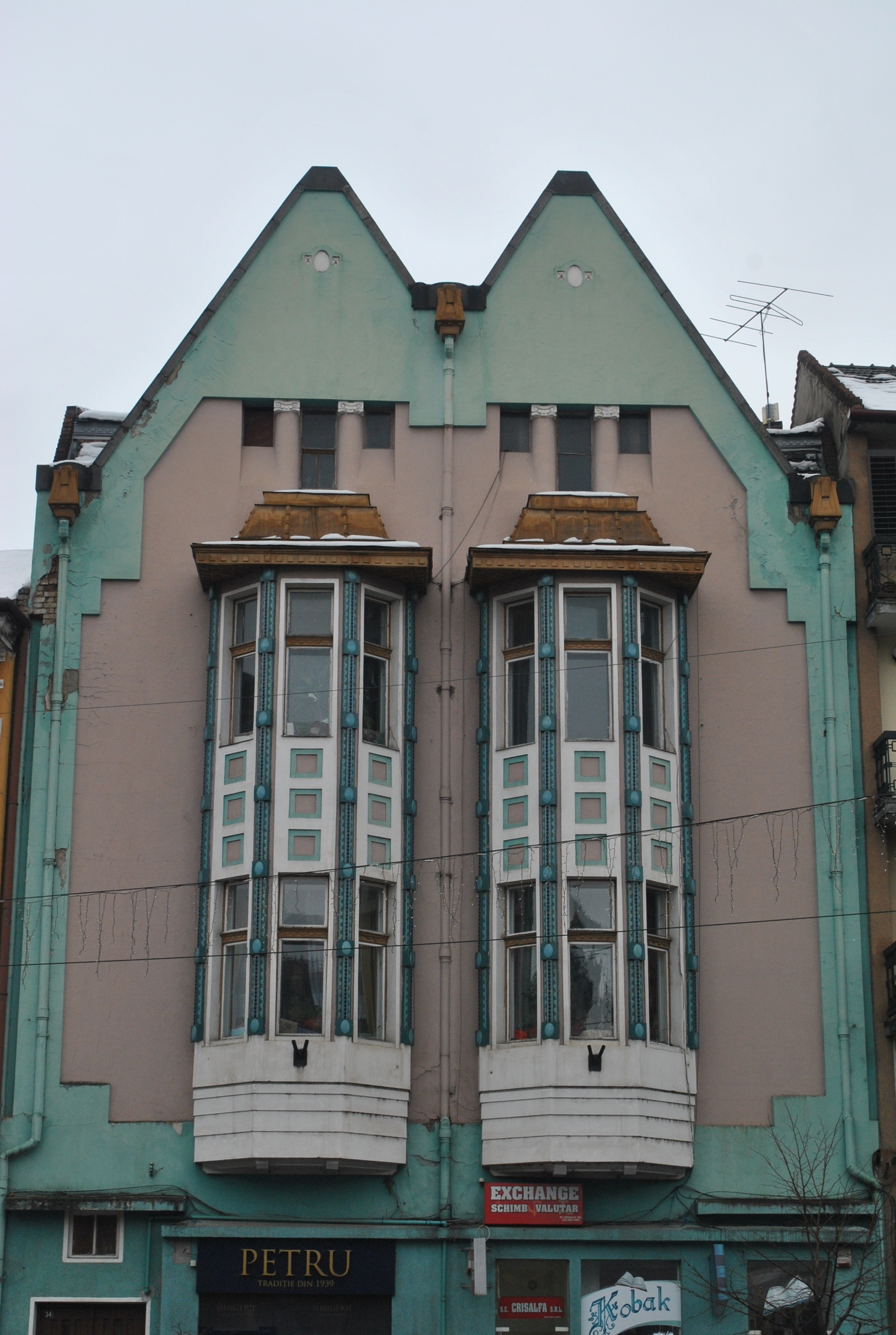 Casă, 1900